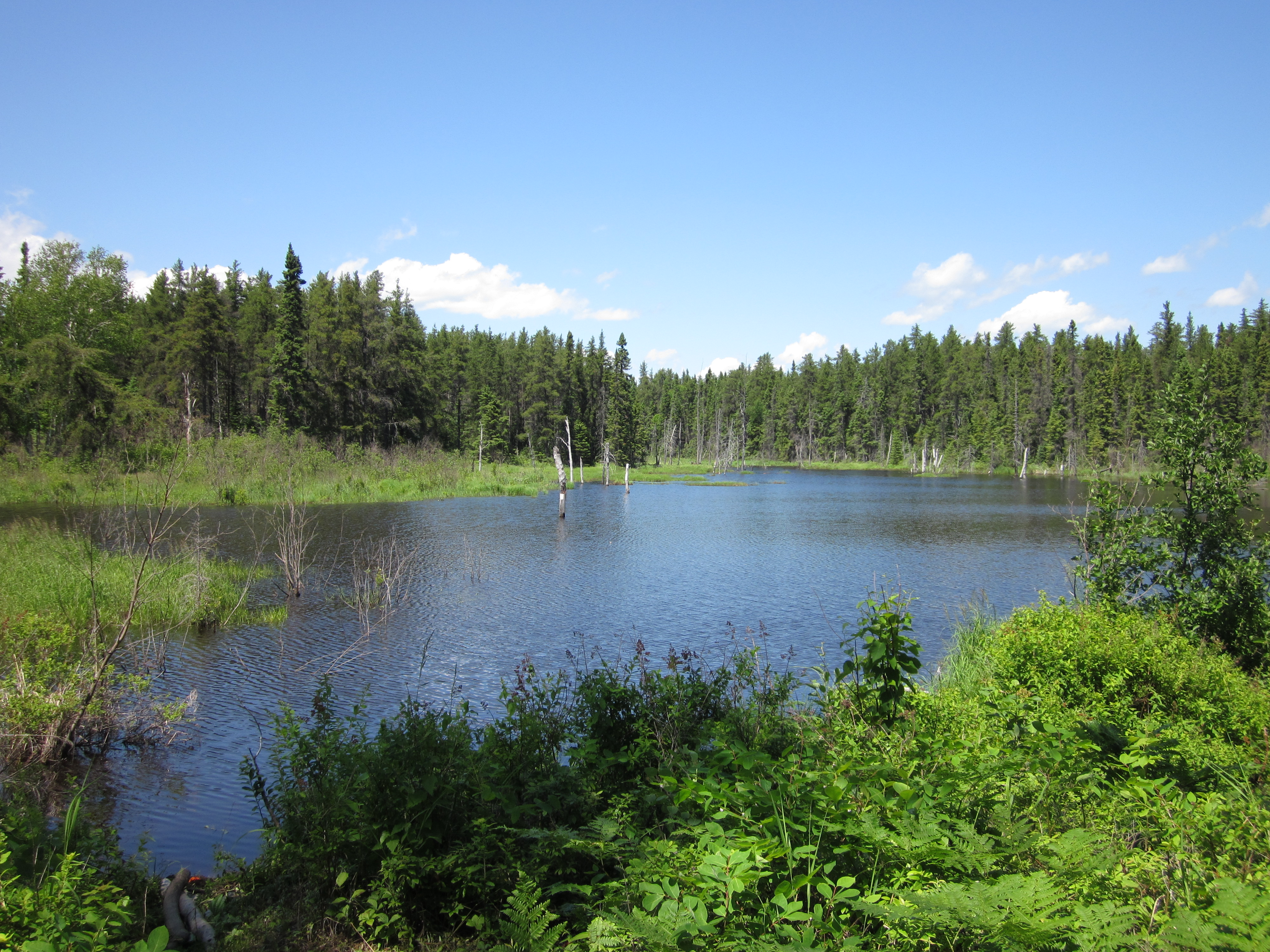 Marais dans le parc national de la Pointe-Taillon